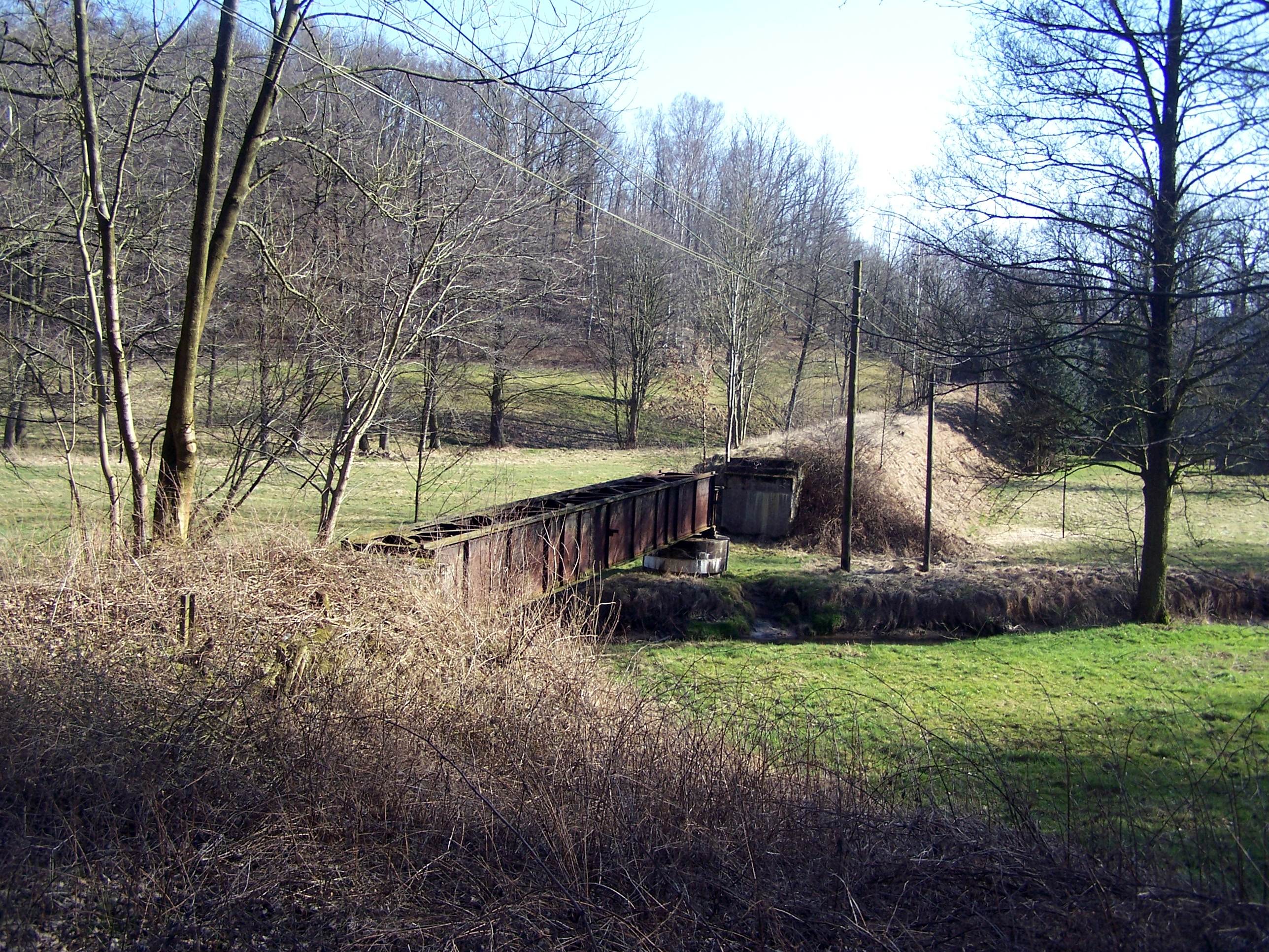 Brücke und Bahndamm der stillgelegten Strecke der Schmalspurbahn Wilsdruff-Gärtitz bei Polenz, Landkreis Meißen